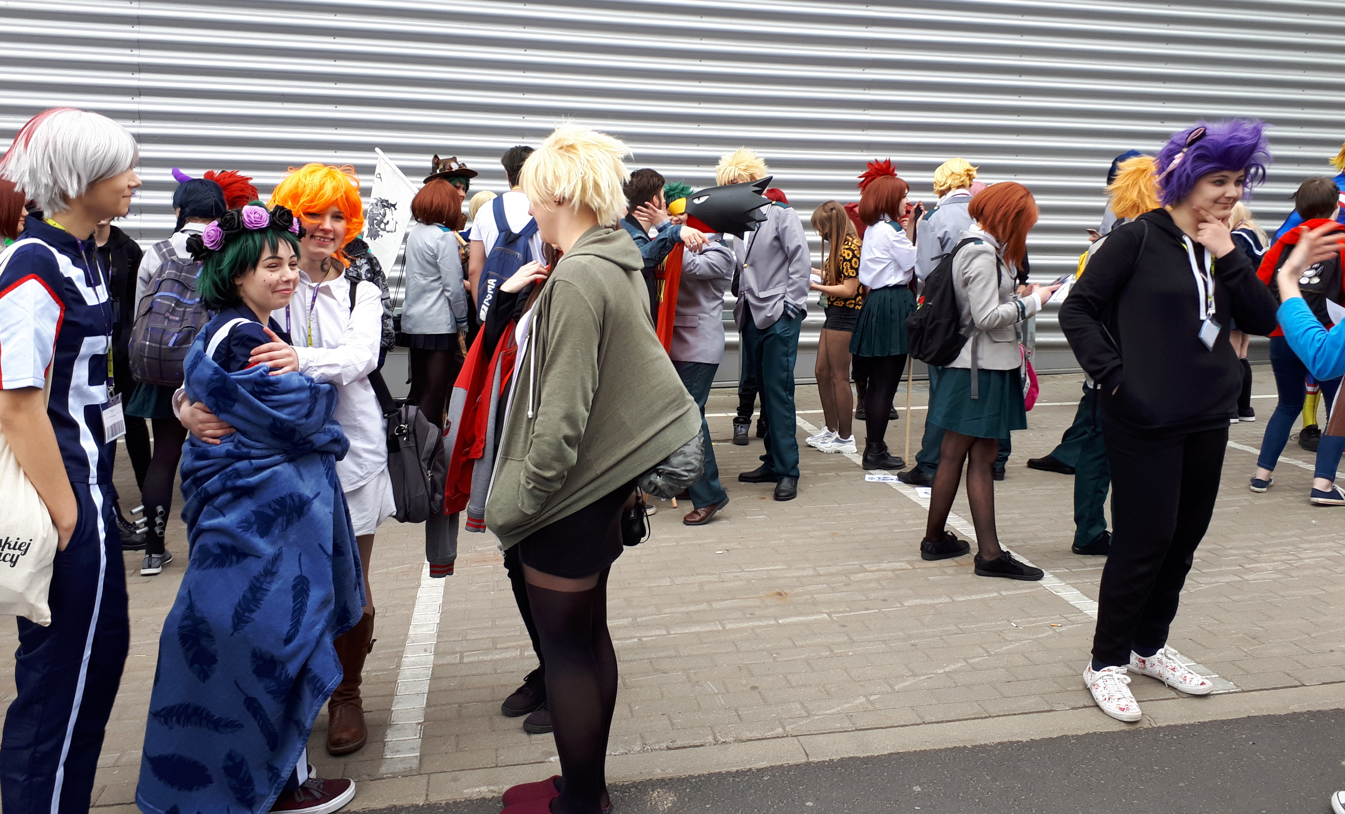 Uczestnicy konwentu Pyrkon 2019 w cosplayach postaci Boku No Hero Academia (My Hero Academia)